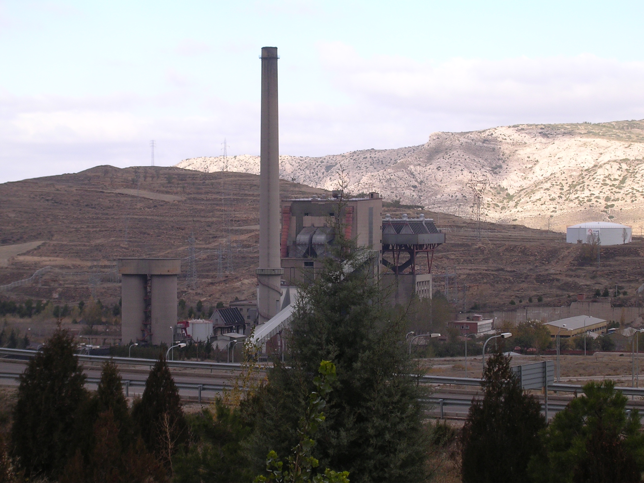 Aragonés: Zentral termica d'Escucha (Tergüel).